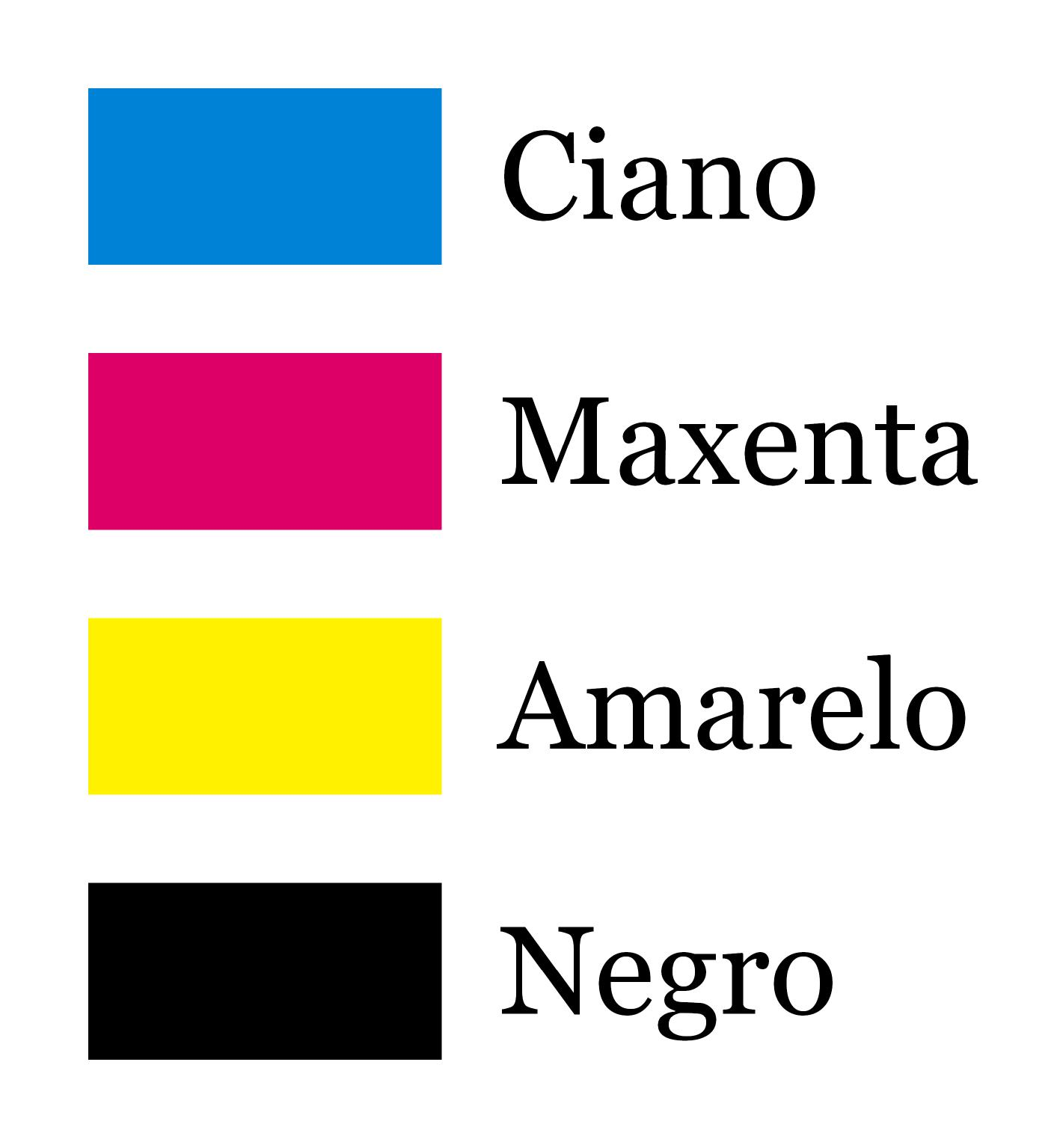 Táboa de cores primarias no sistema CMYK